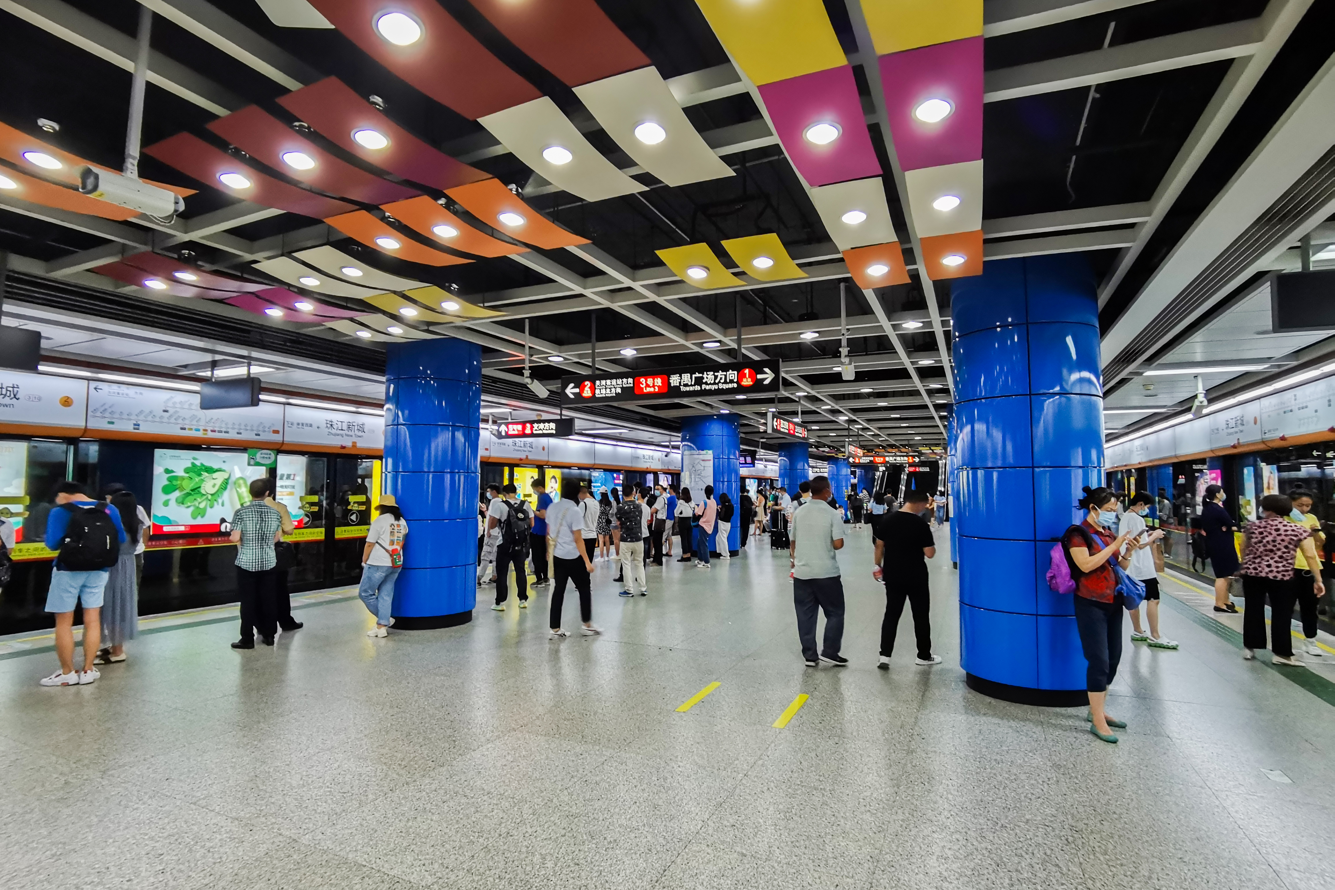 广州地铁珠江新城站